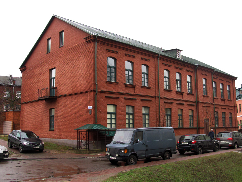 Мінск. Вуліца Віцебская, 21А